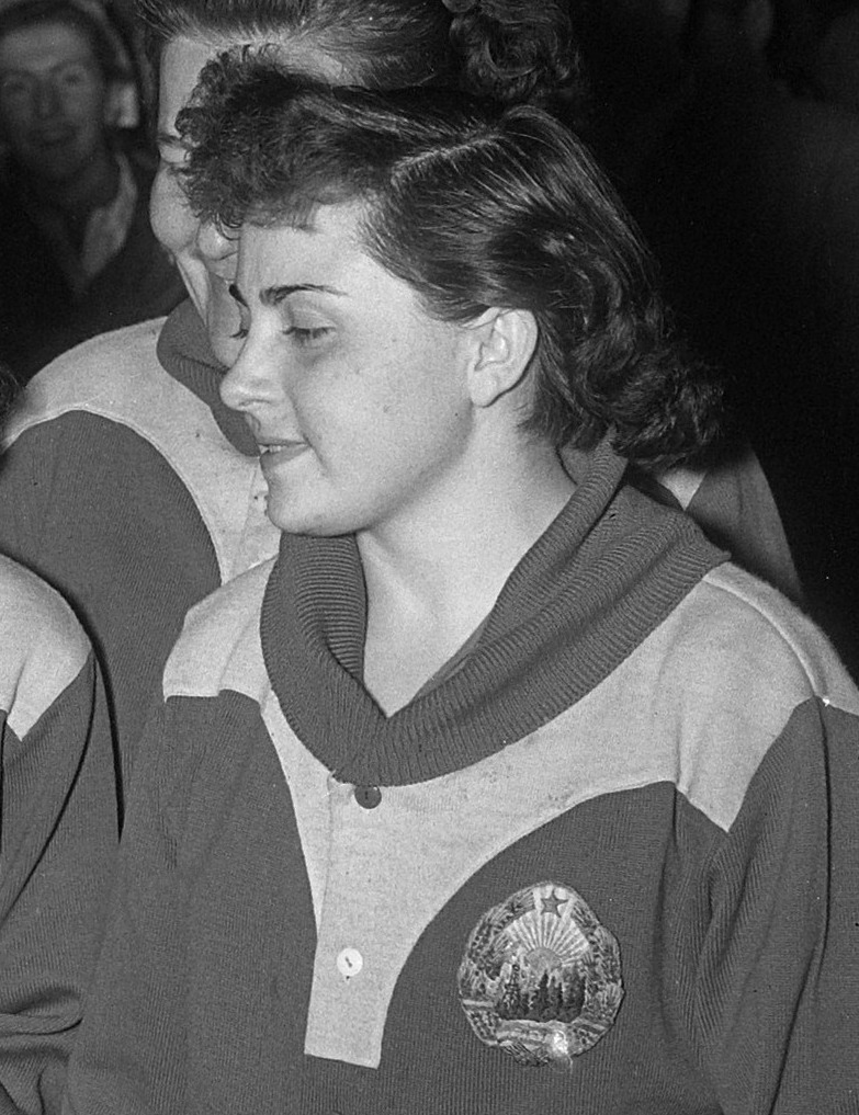 Tafeltennis Utrecht Roemeense dames de wereldtitel